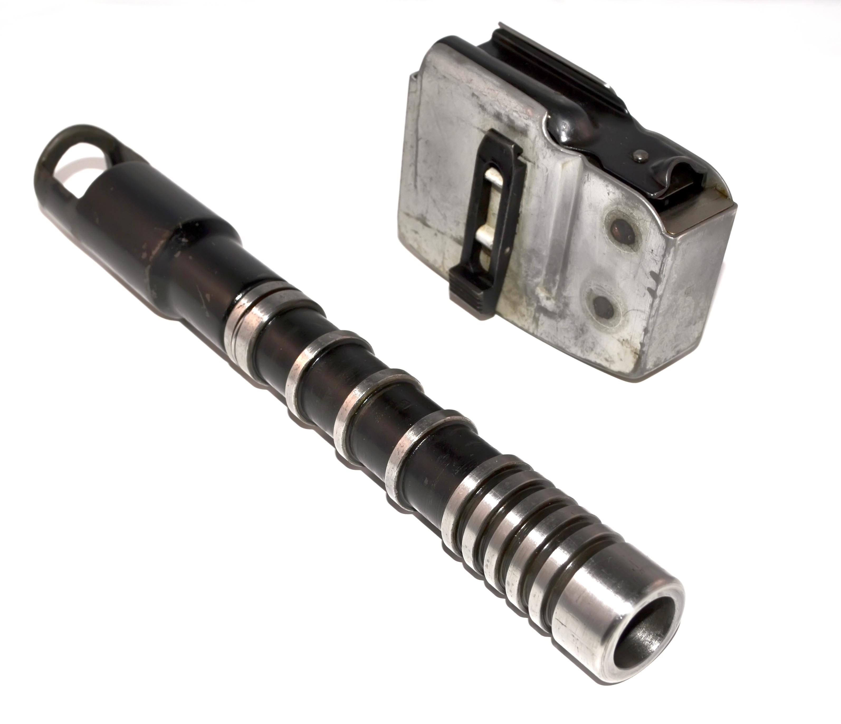 Tromblon et magasin blanc du Mq31